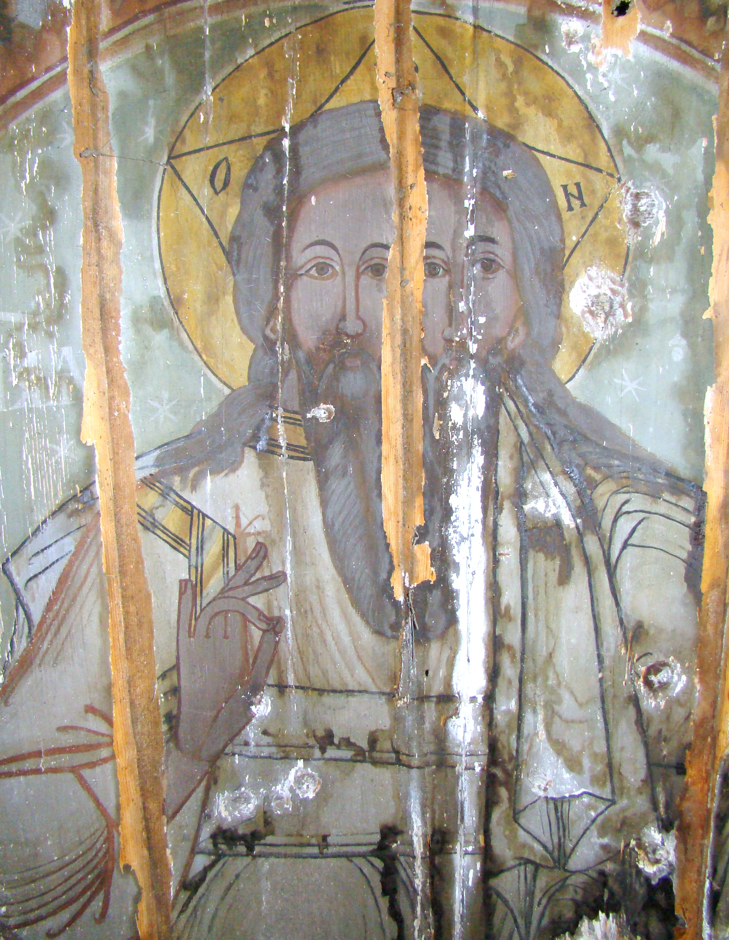 Biserica de lemn Sf.Nicolae Cuștelnic-interioare